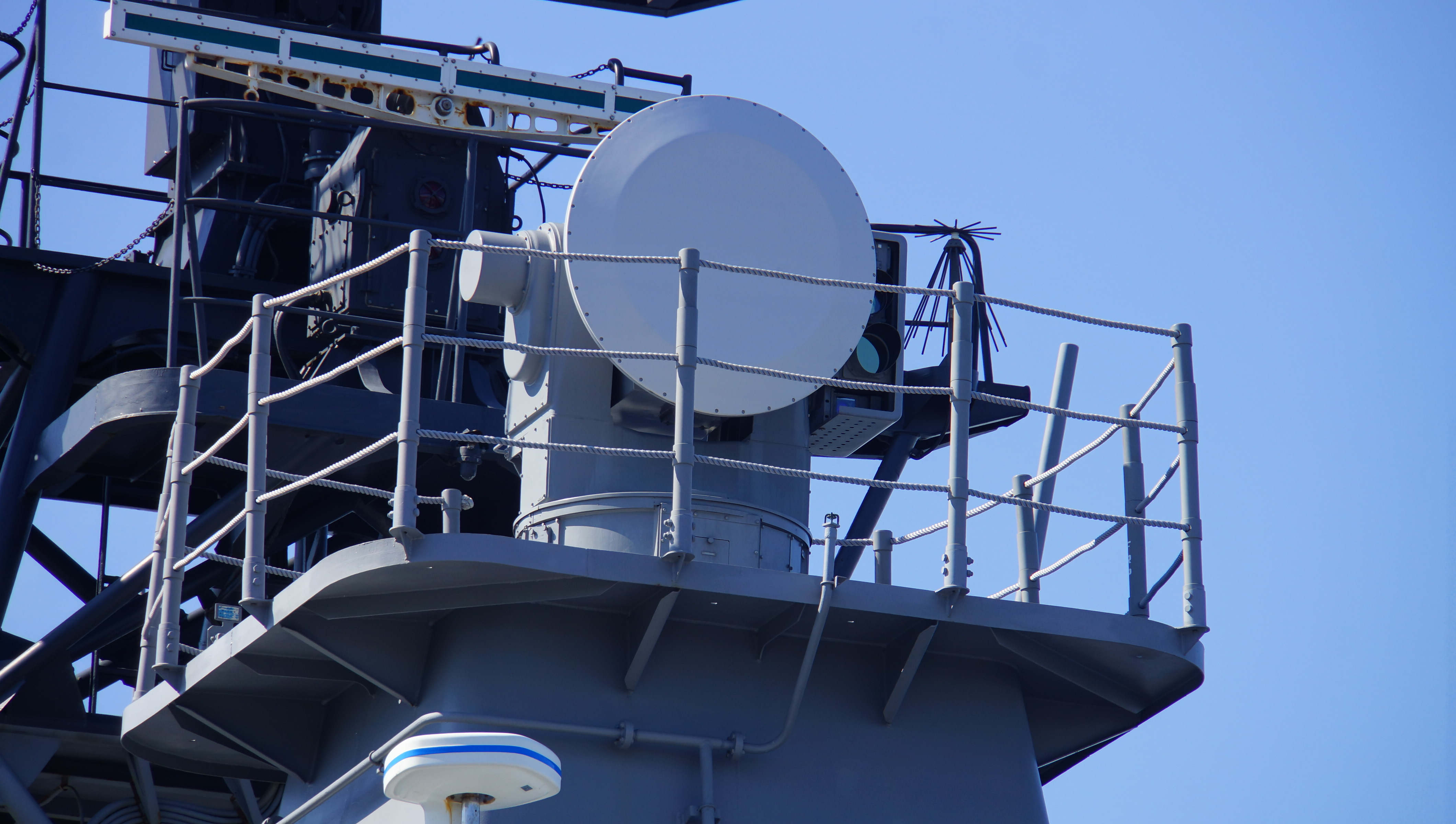 海上自衛隊 ミサイル護衛艦はたかぜ（DDG-171）艦上の81式射撃指揮装置2型21C。 14年10月19日 堺泉北港にて。